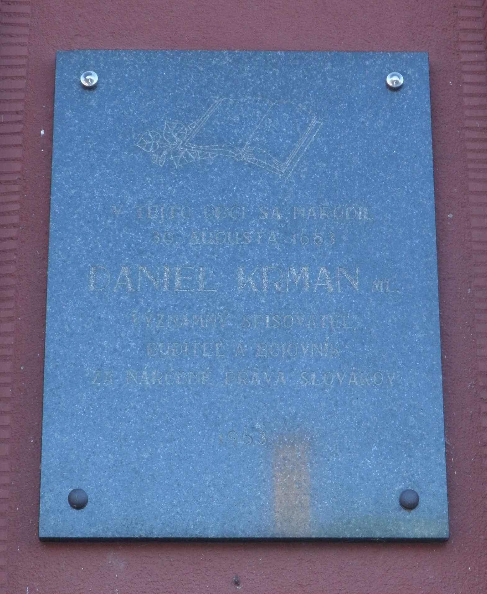 Pamětní deska Daniela Krmana v jeho rodišti (Omšenie)